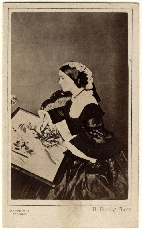 Photograph by Henry Hering